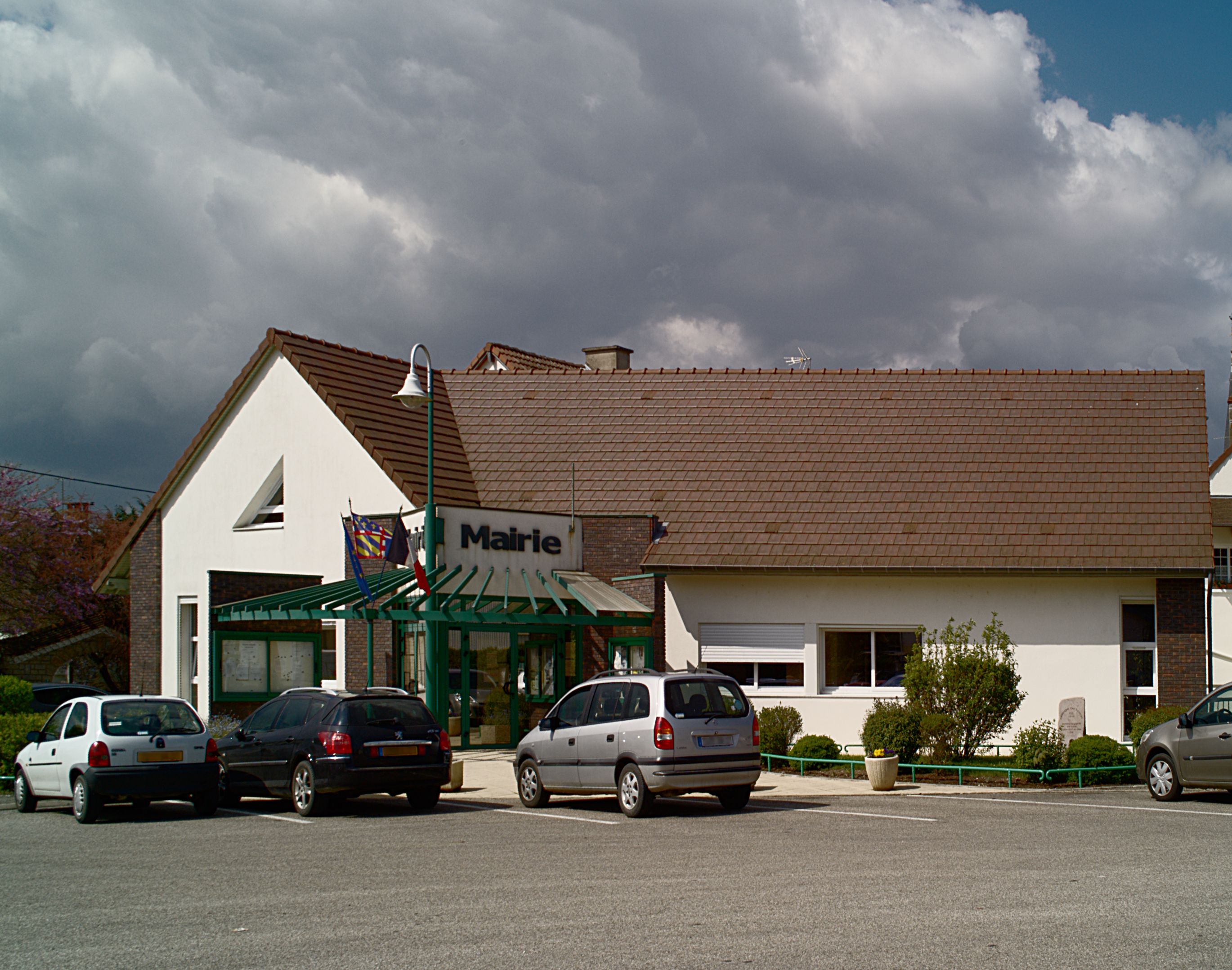 Mairie, Rue Nationale, Losne (Côte d'Or, Bourgogne, France)